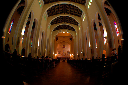 Interior de la Catedral de la Santísima Concepción, Concepción, Chile.